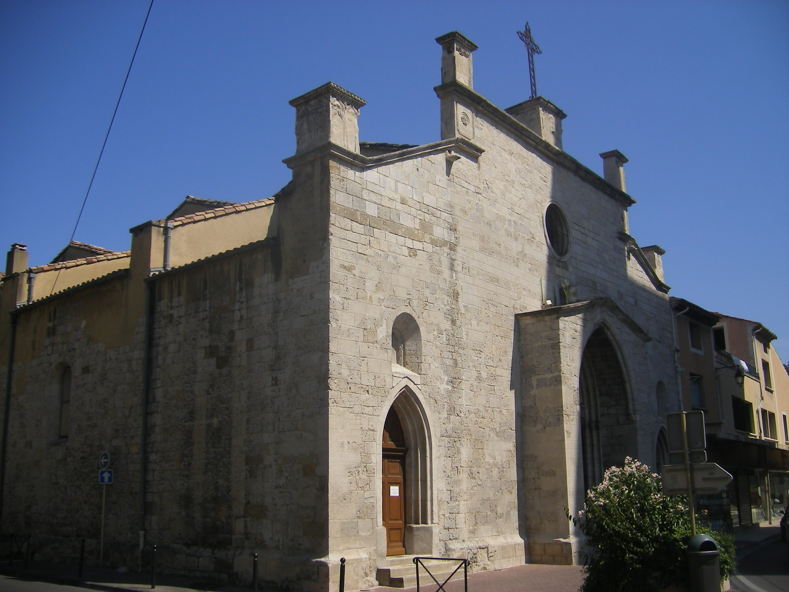 Église Saint-Florent à Orange